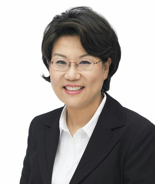 이혜훈의원 프로필 사진